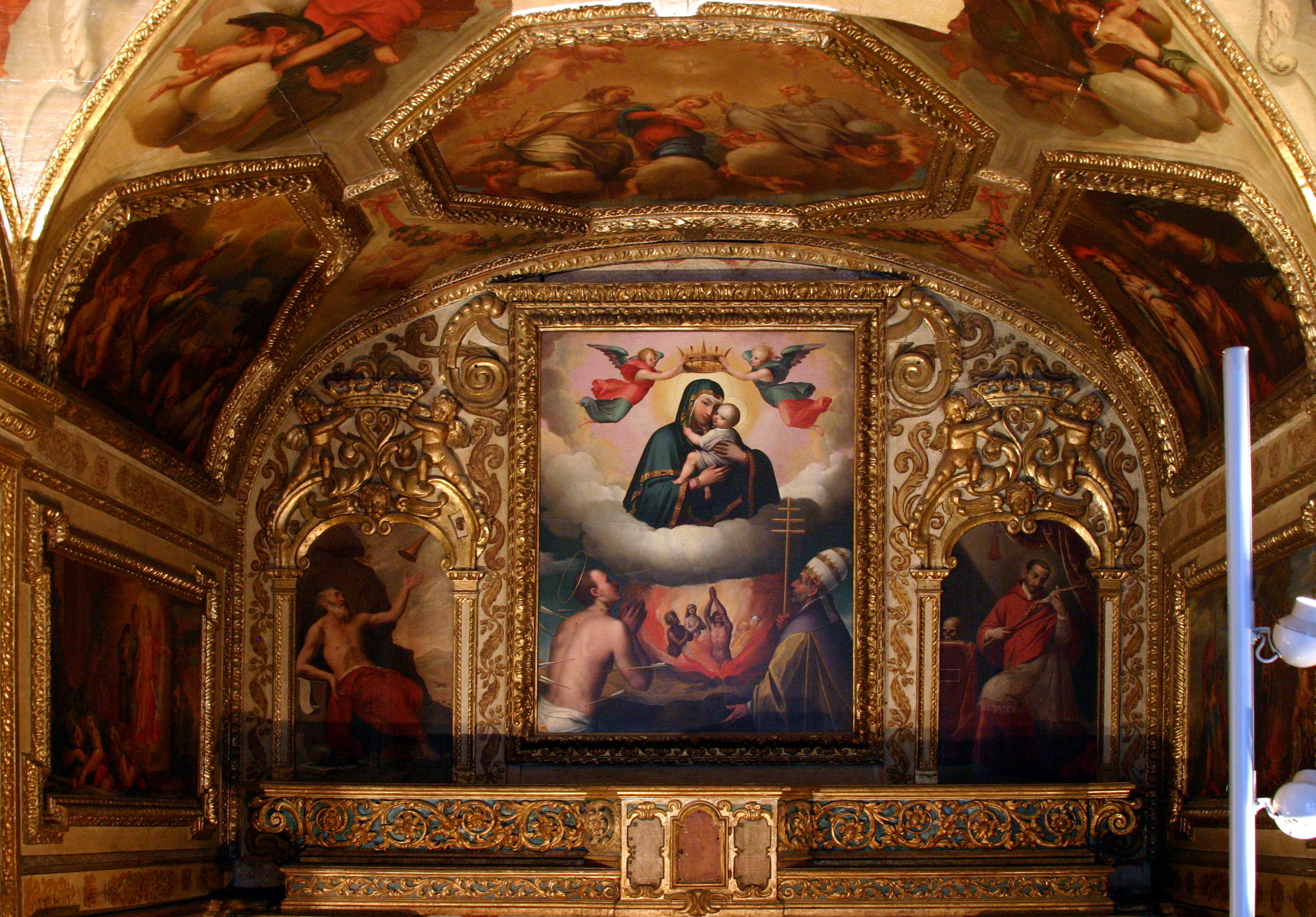 Castel Nuovo - Nápoles